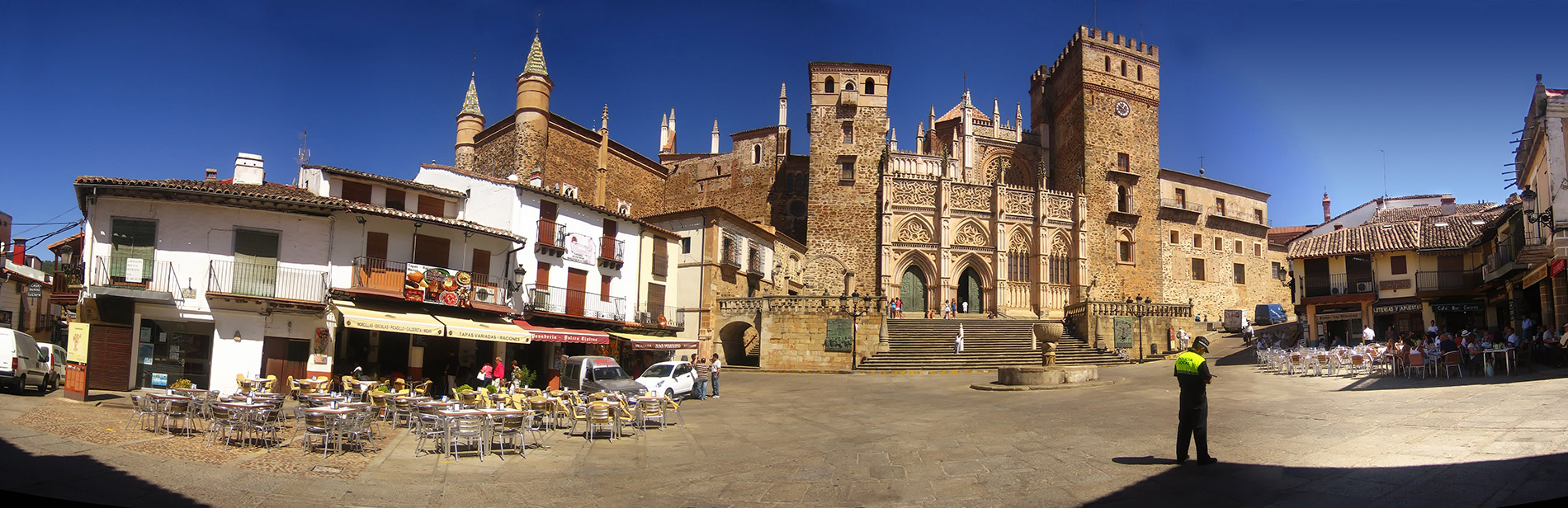 Plaza de Guadalupe, Agosto 2012.